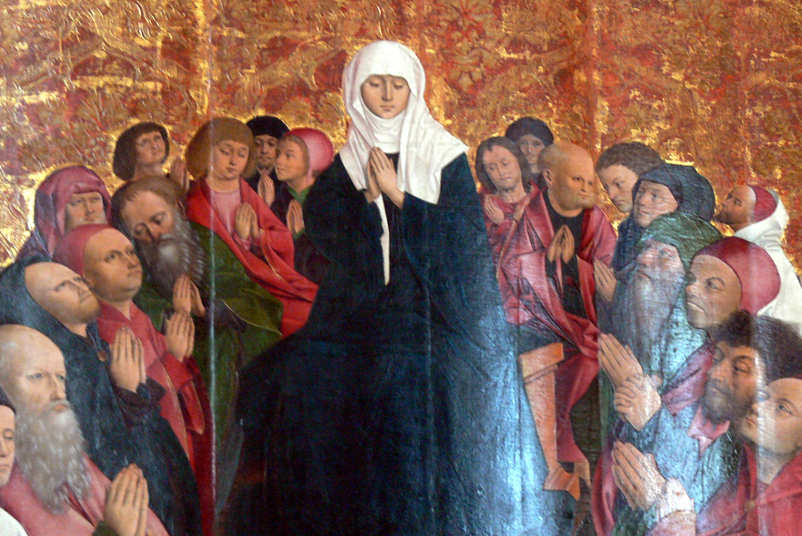 Großgmain ( Salzburg ). Liebfrauenkirche: ( 1499 ) - Detail.